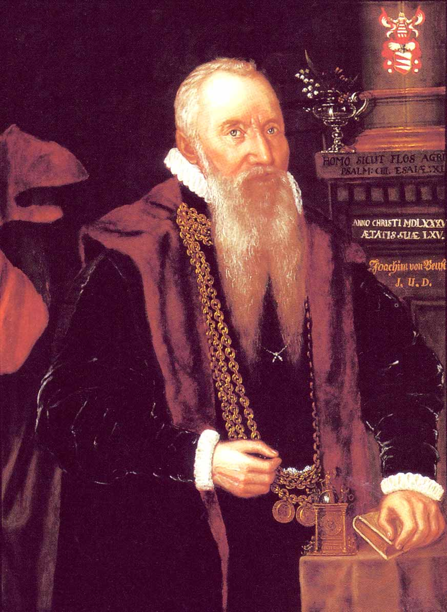 Porträtgemälde von Joachim von Beust (1522-1997) deutscher Jurist